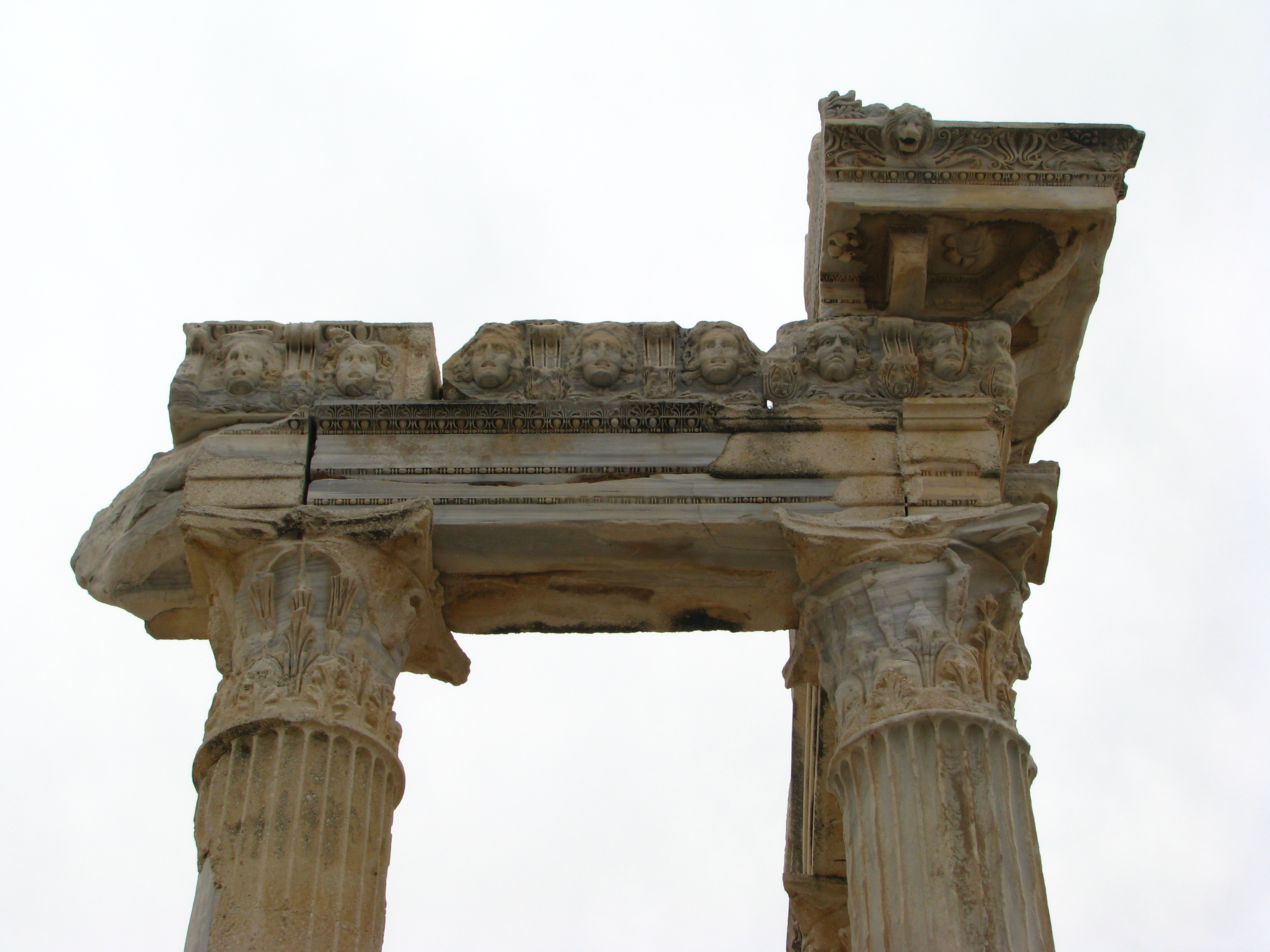 Temple of Apollo in Side